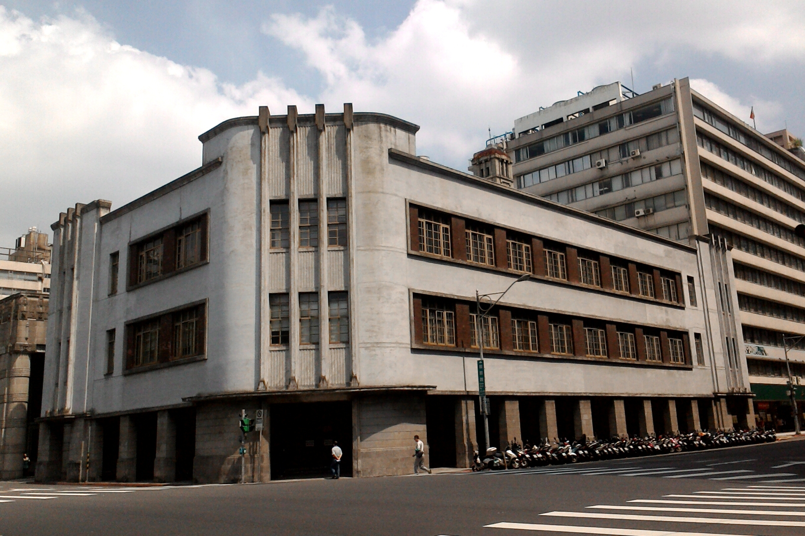 三井物產株式會社舊廈,台北市中正區城內次分區黎明里